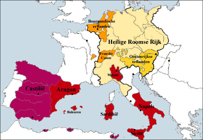 De rijken van keizer Karel V